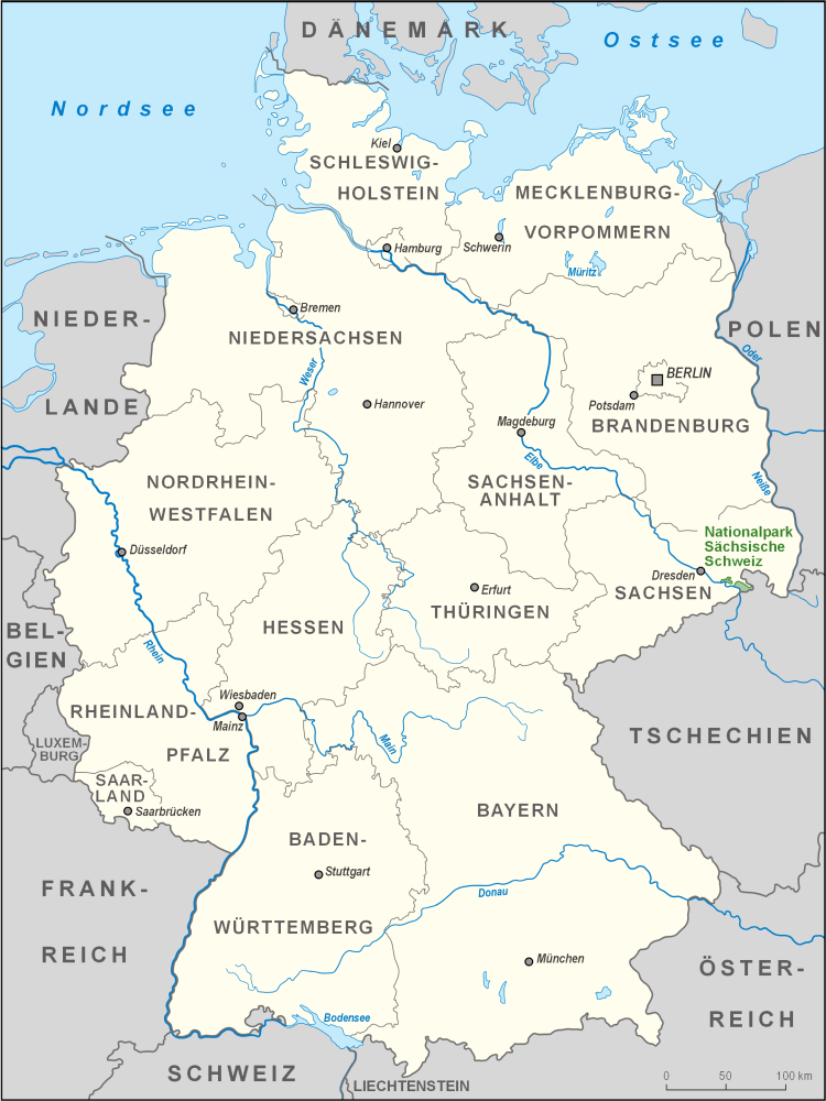 Karte des Nationalparks Sächsische Schweiz in Deutschland